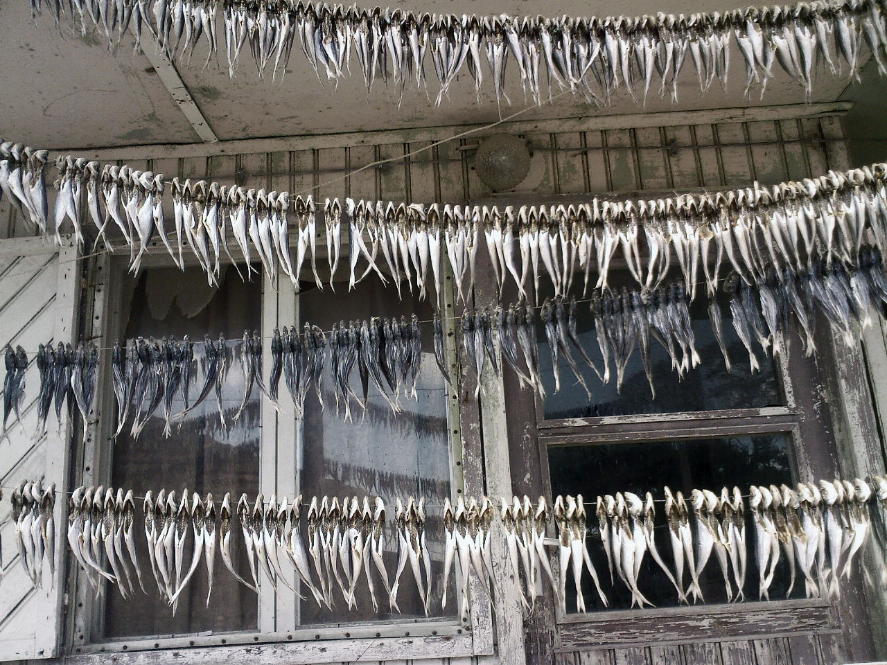 Чирози - сушен сафрид